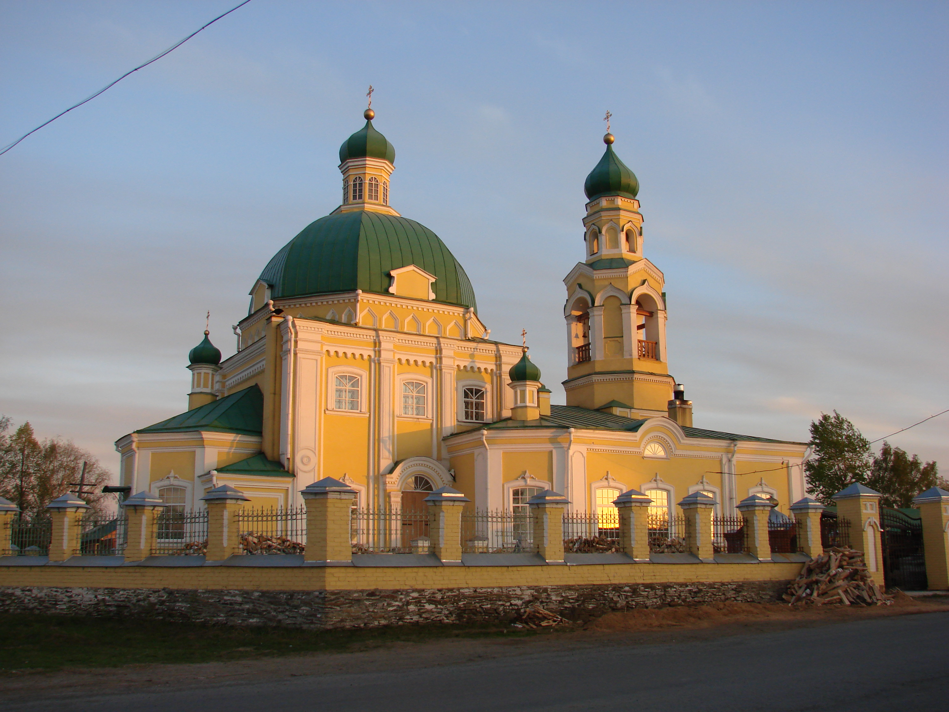 с. Николо-Павловское, Церковь Николая Чудотворца (ул. 8 Марта, 68). Год постройки: 1886 г.